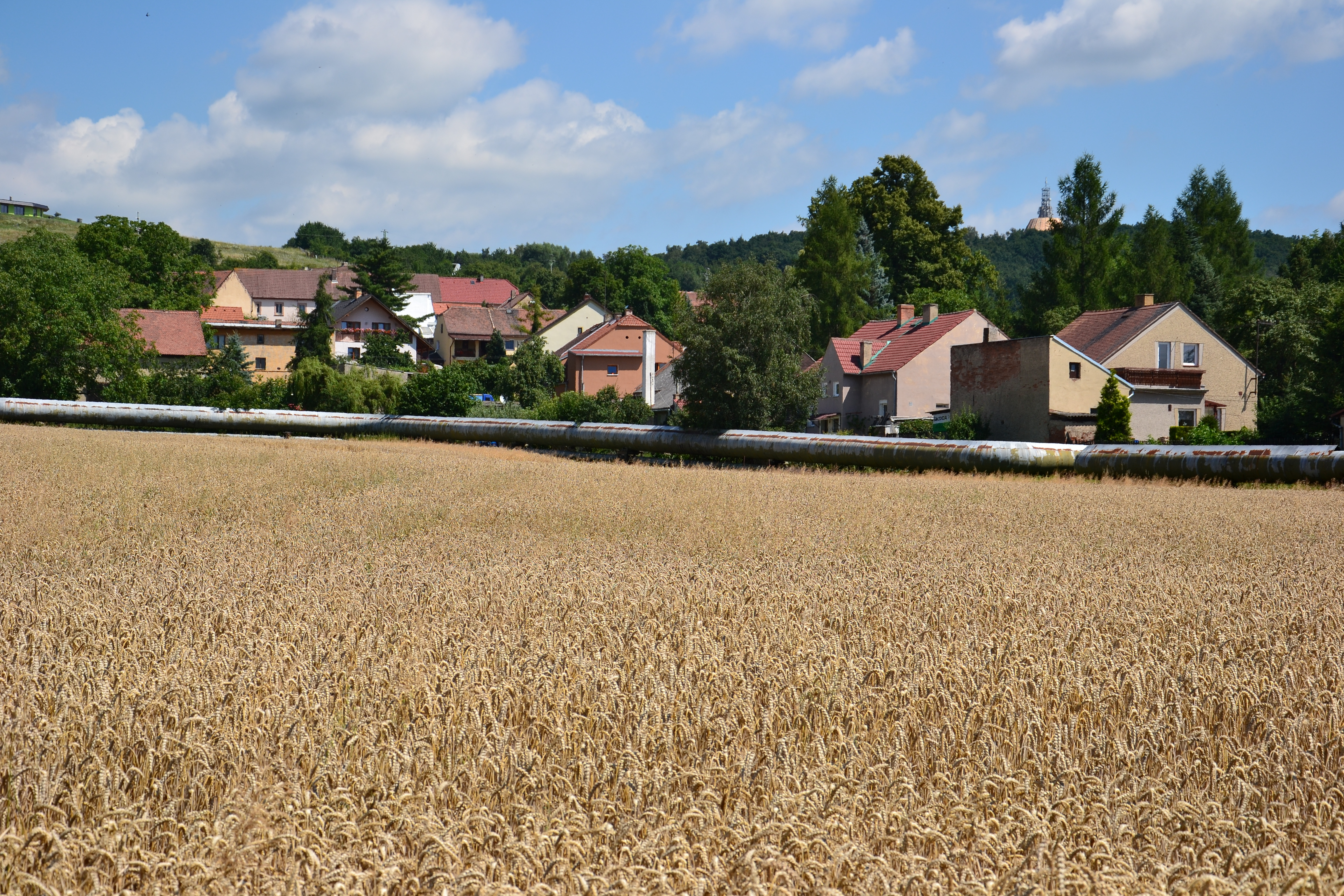 Pohled z jihozápadu